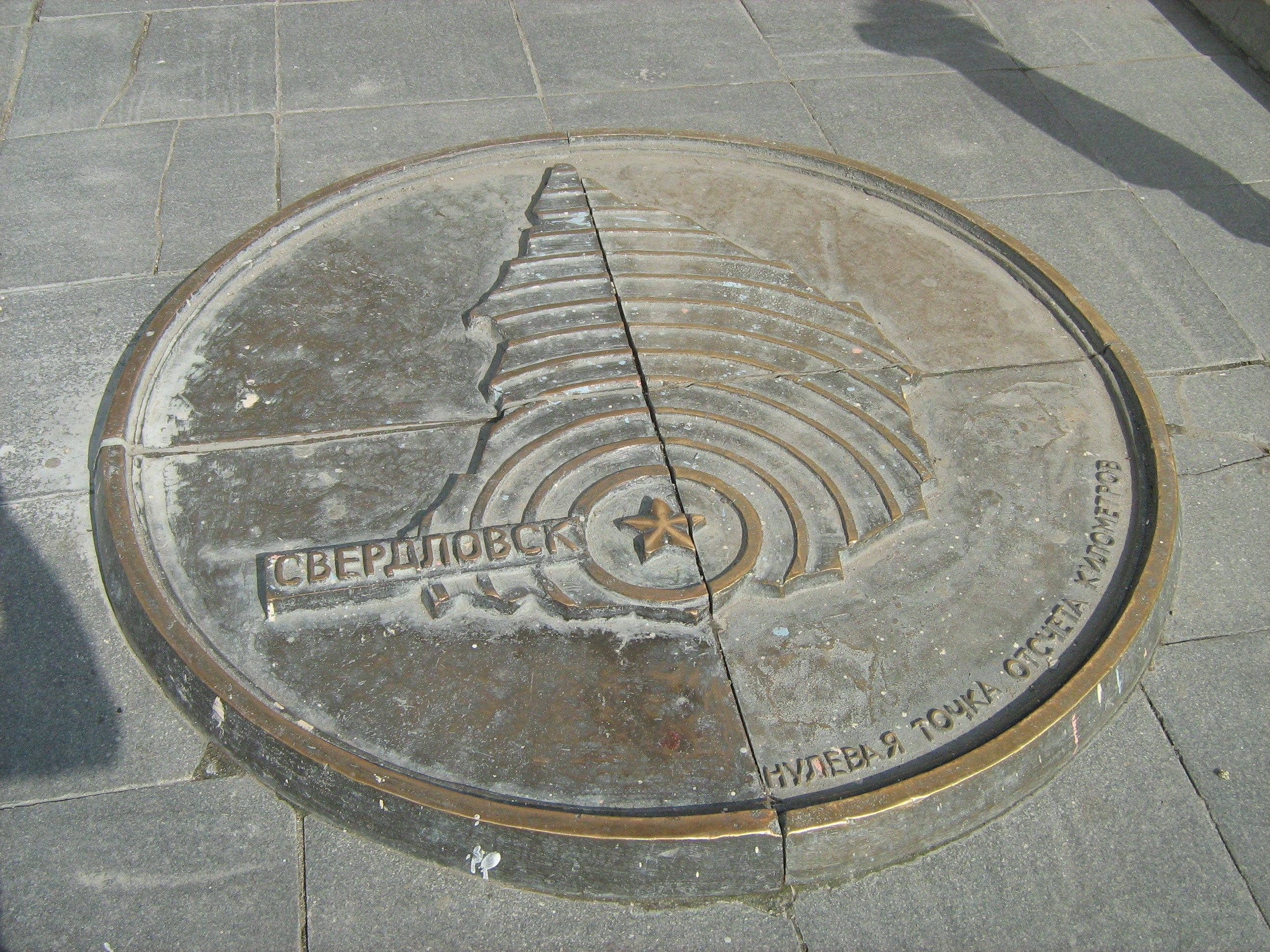 Нулевая точка отсчета километров, г. Екатеринбург